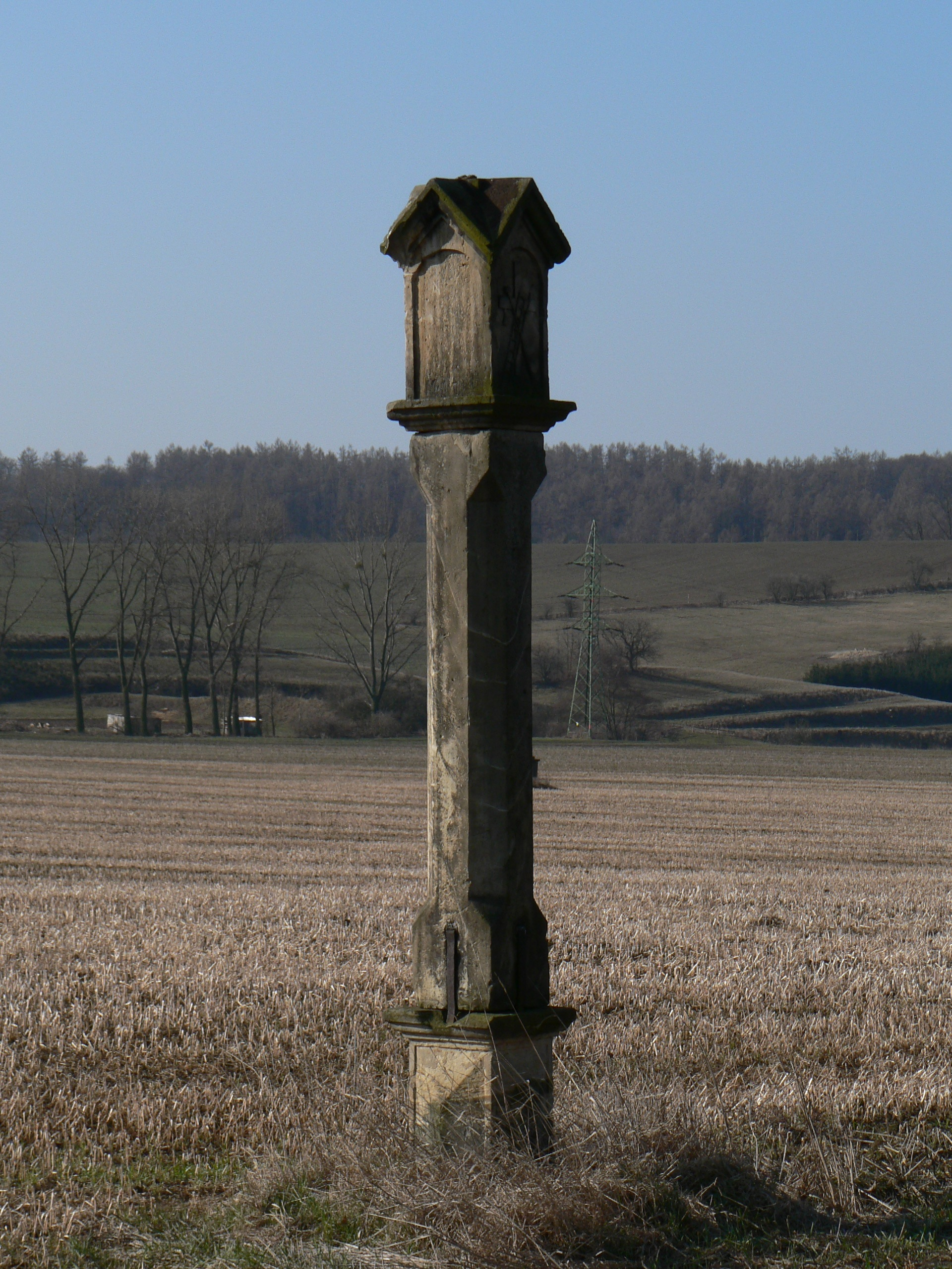 Pilířová boží muka u silnice k Úsovu, 2. polovina 18. století